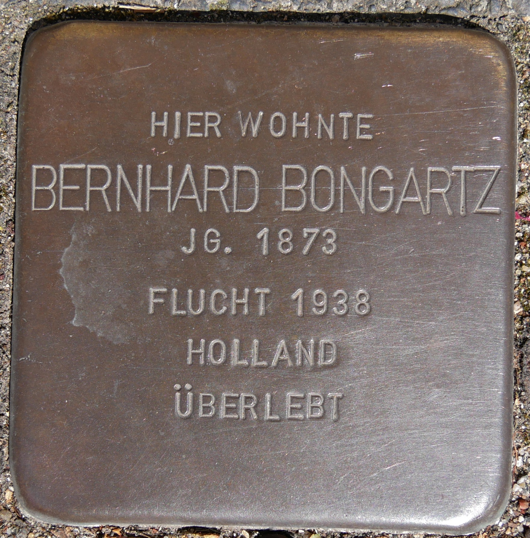 Stolperstein Bongartz Bernhard, Wesel, Reeser Landstr. 4